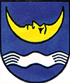 Wappen der ehemaligen Gemeinde Ennetach